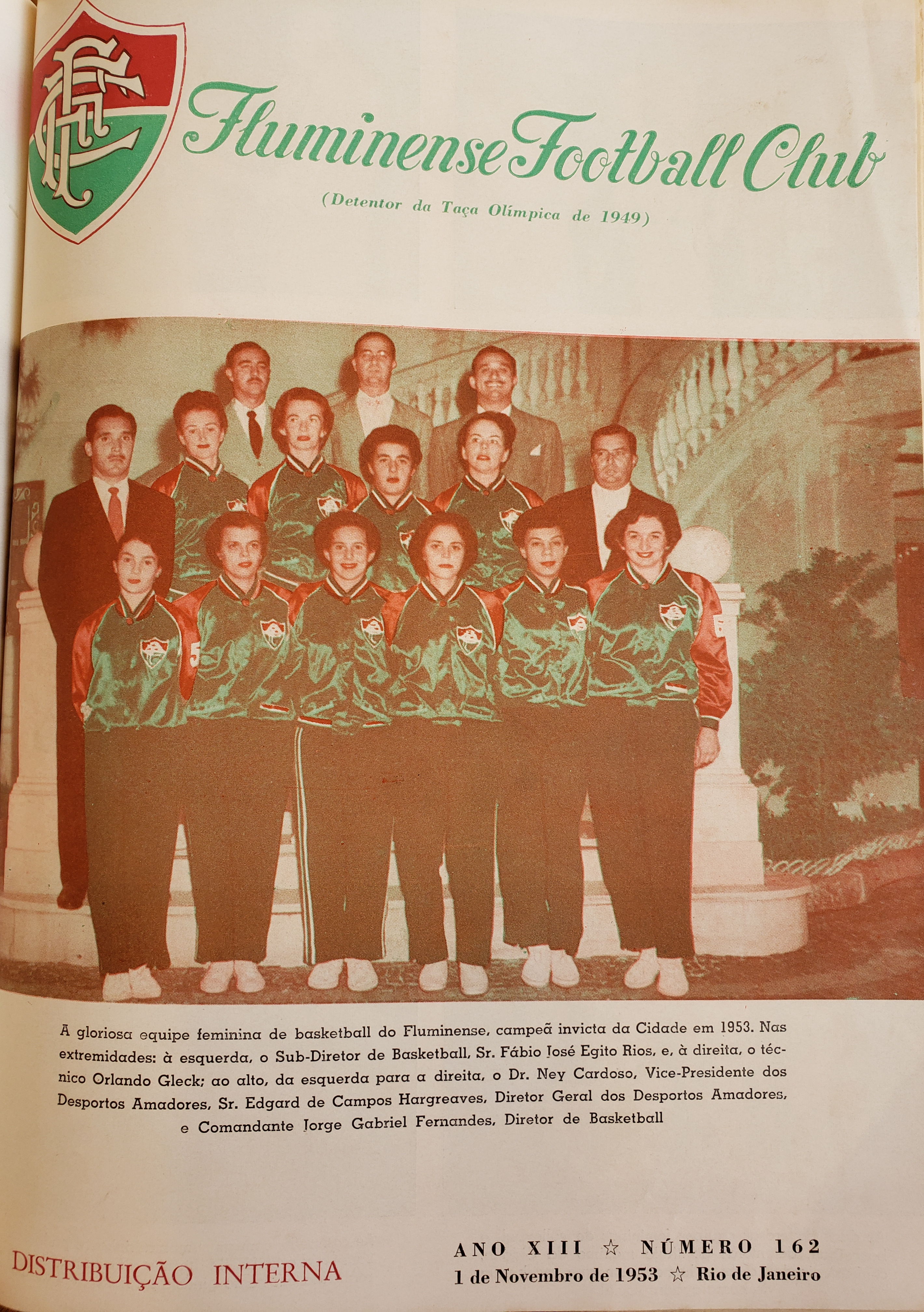 Fluminense campeão carioca de basquete feminino de 1952 na Revista do Fluminense.